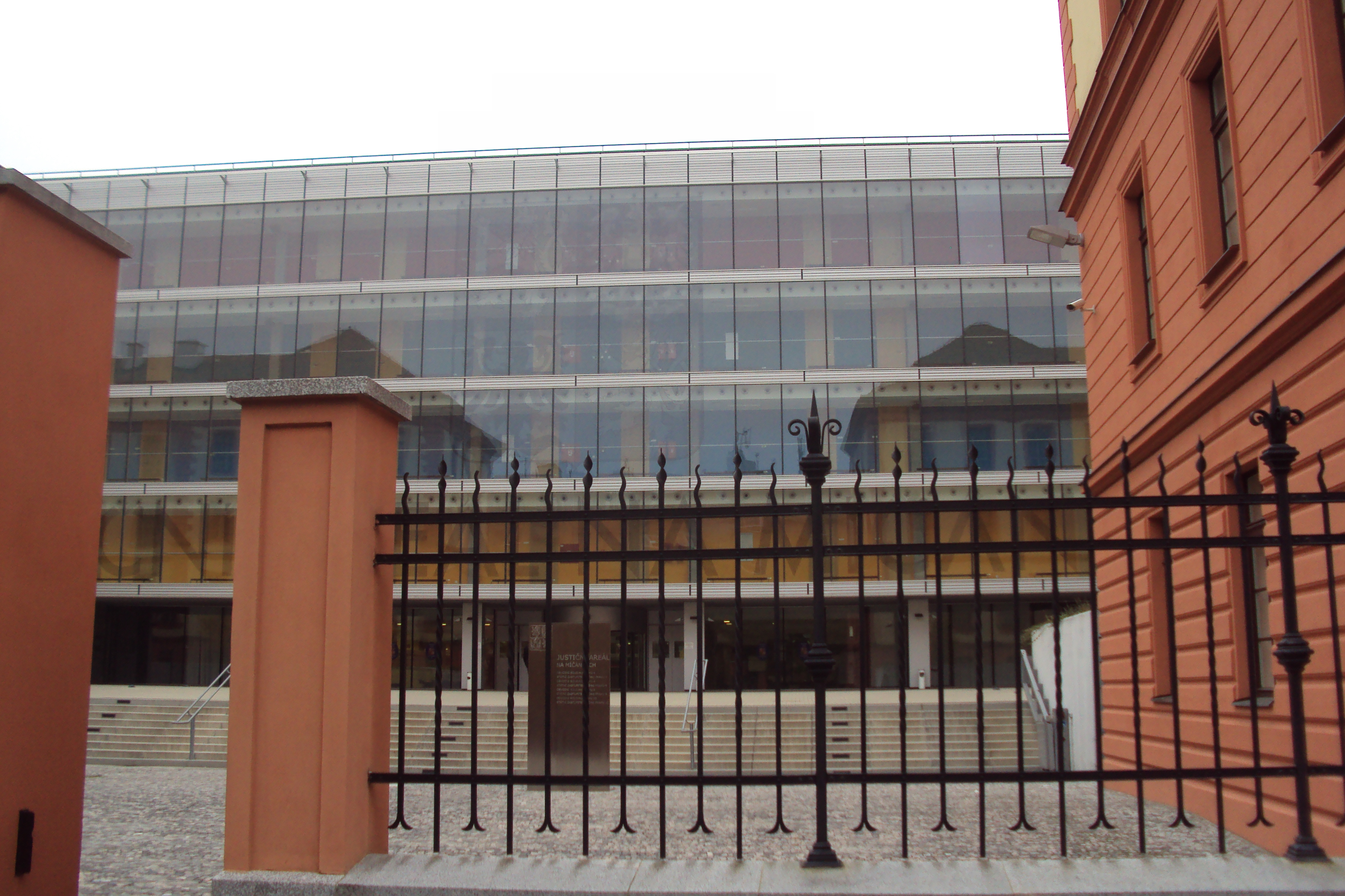 Justiční areál Na Míčankách v Praze 10, Vršovicích, pohled zvenčí na čelní starší část